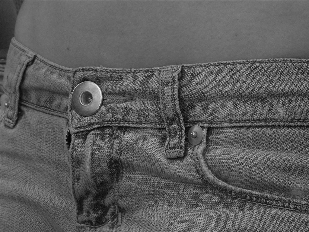 Jeans